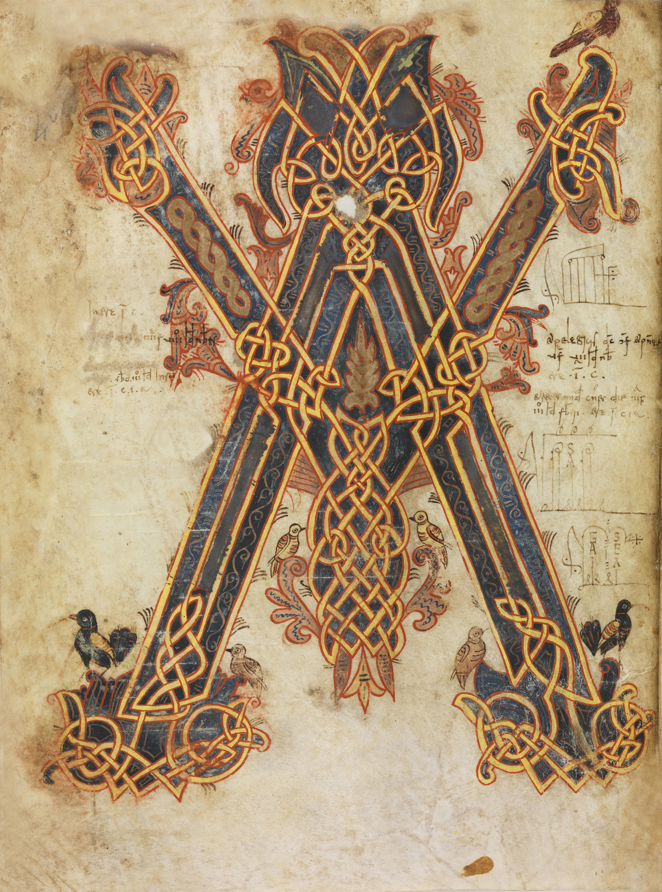 Folio 4v do Antifonario visigótico-mozárabe da catedral de León (c. séc. X)